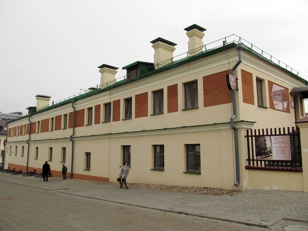 Мінск. Вуліца Кірыла і Мяфодзія, 2 / вуліца Зыбіцкая, 23